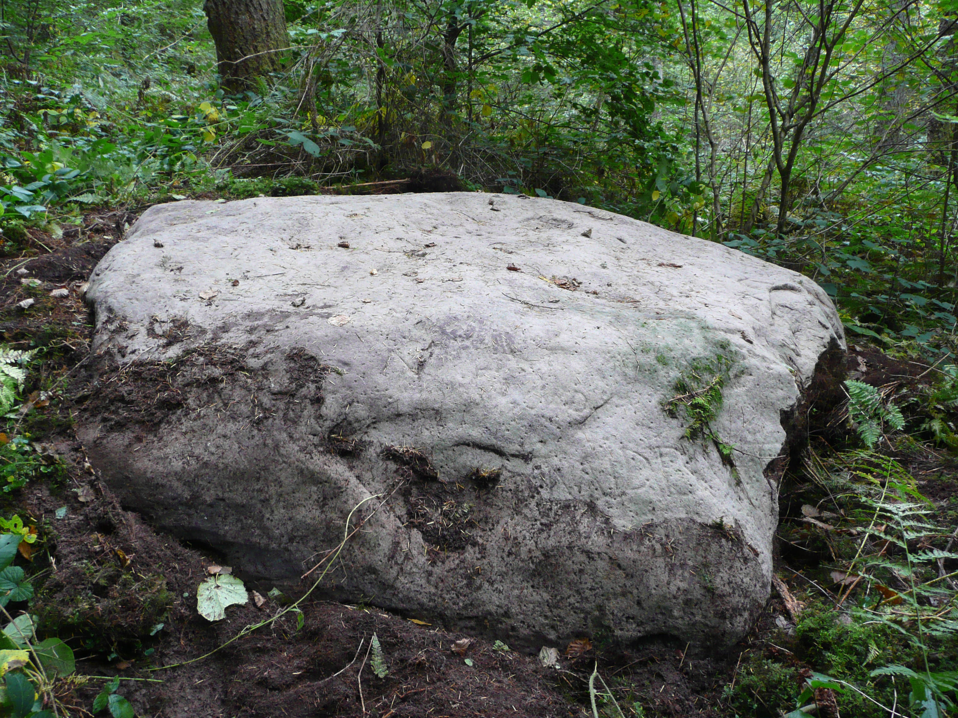 Roche couverte de pétroglyphes néolithiques et de croix gravées